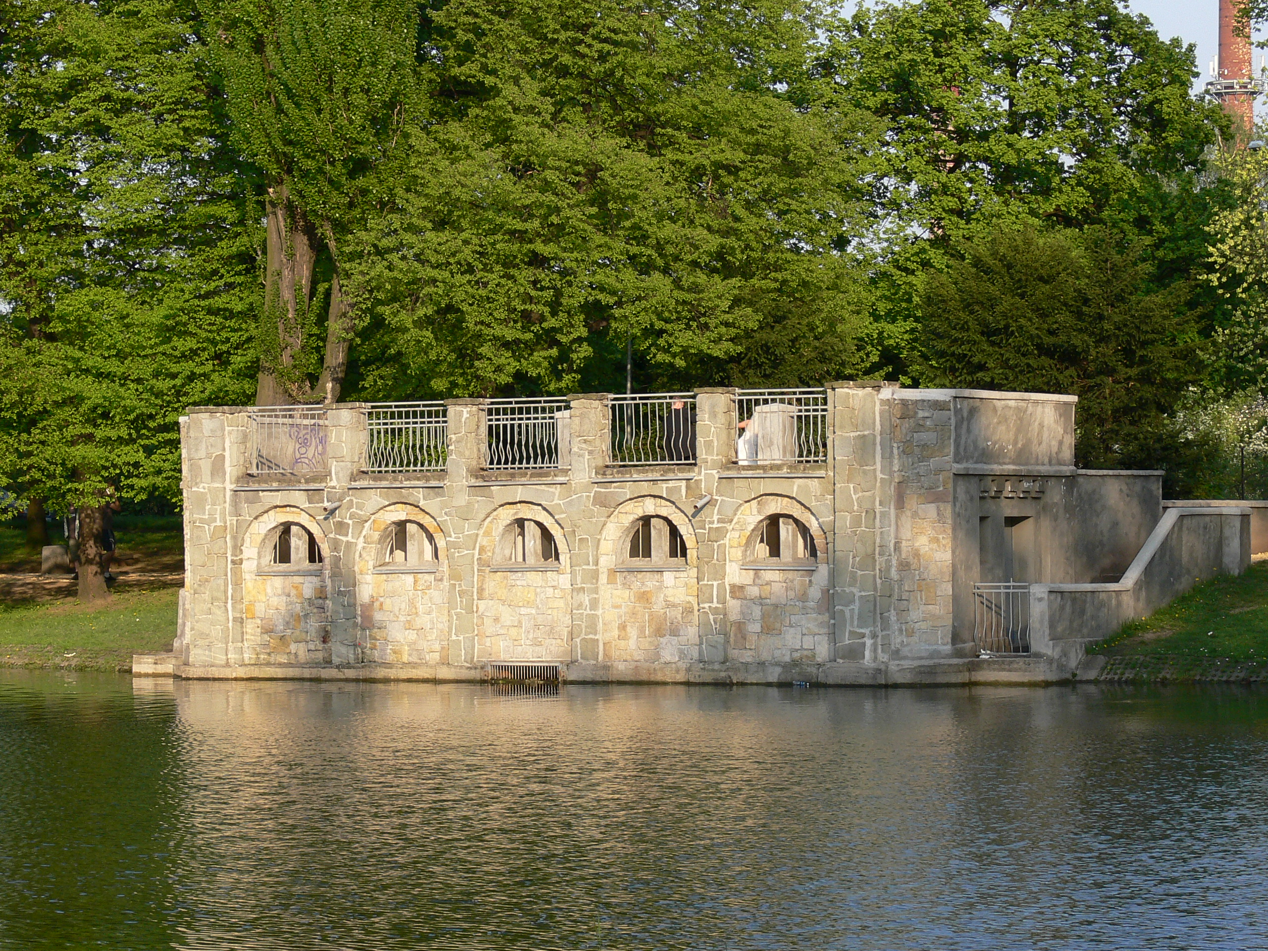 Racibórz — Park im. Miasta Roth: szalet